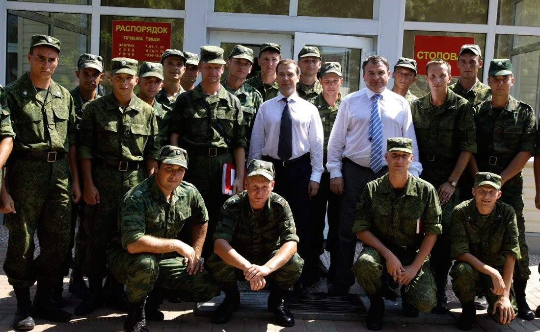 Посещение российской военной базы в Гудауте (Russian military base in Gudauta).